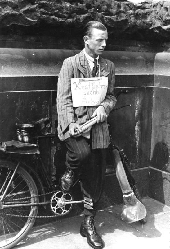 Hamburg, arbeitsloser Kraftfahrer Illus-dpd Kraftfahrer sucht Arbeit. Dieser Kraftfahrer versucht sein Glück auf eigene Faust, da ihm das Hamburger Arbeitsamt eine Stelle wegen des Überangebots auf dem Arbeitsmarkt nicht vermitteln kann. Mit einem Schild vor der Brust wartet er geduldig an sein Fahrrad gelehnt auf seine Stunde. 14-7-49 [Herausgabedatum] 3618-49 [Hamburg.- Arbeitsloser mit Schild um den Hals "Kraftfahrer sucht Arbeit"]